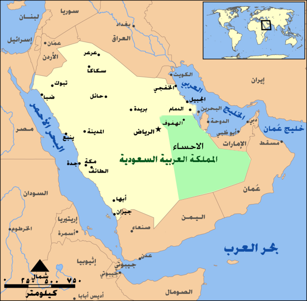 Arabic-language map of El-Hasa (Al-ahsa الأحساء) region, eastern Saudi Arabia